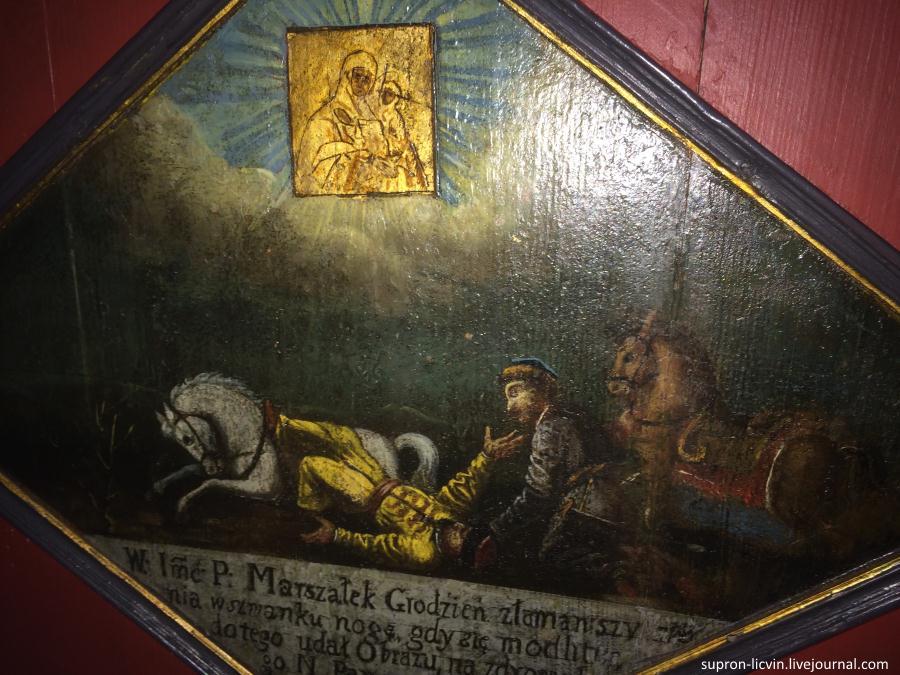 Гродна. Роспіс лавы касцёла Св. Францыска Ксаверыя